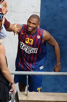 Pete Mickeal